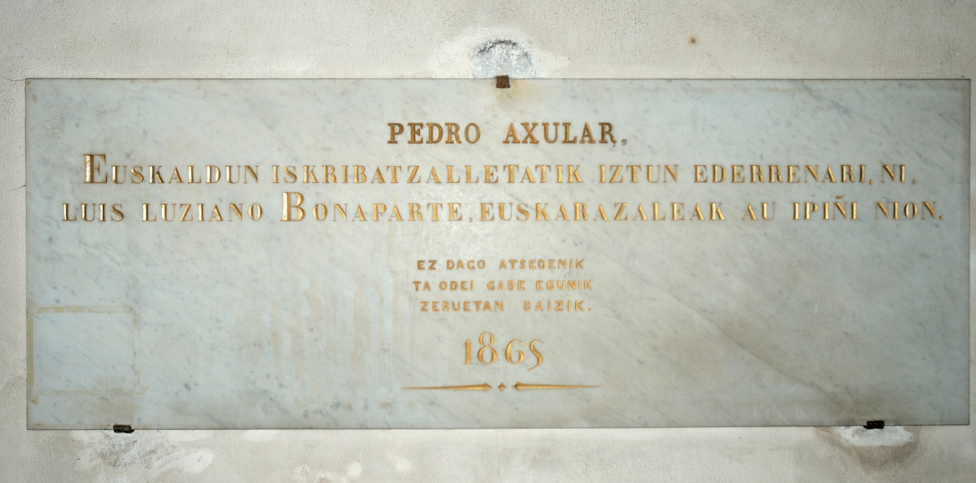 Sare, plaque commémorative de l'écrivain Axular